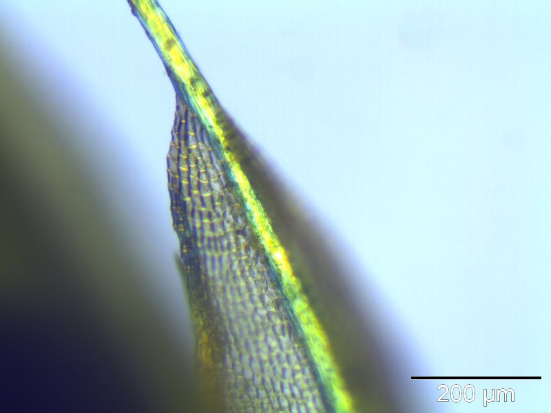 Gespitztes Glanzmoos (Phascum cuspidatum), Blattspitze mit austretender Mittelrippe, Rostock